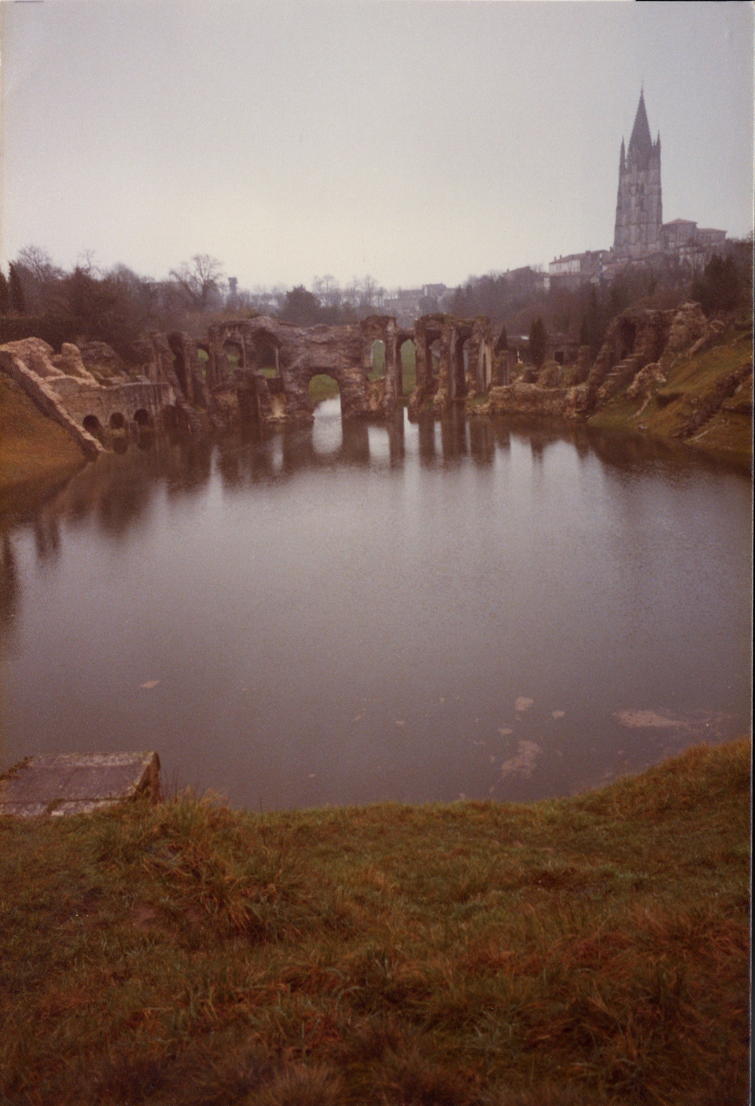 L'Amphithéâtre de Saintes inondé en 1982